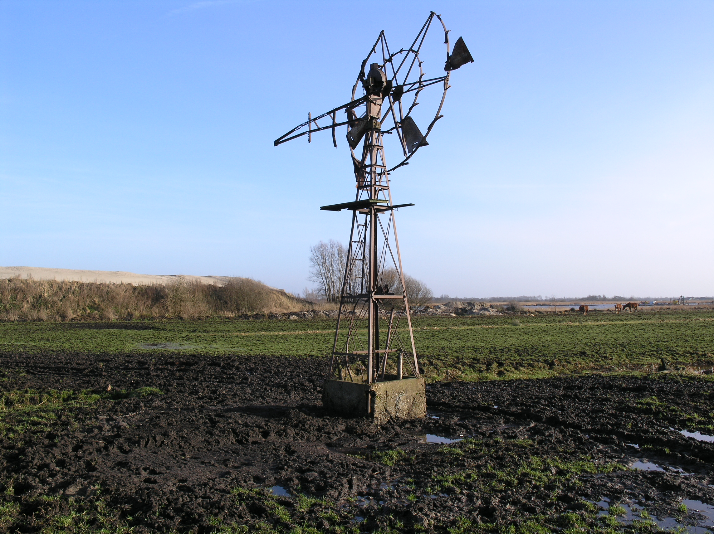 Wolvega Windmotor De Meenthe